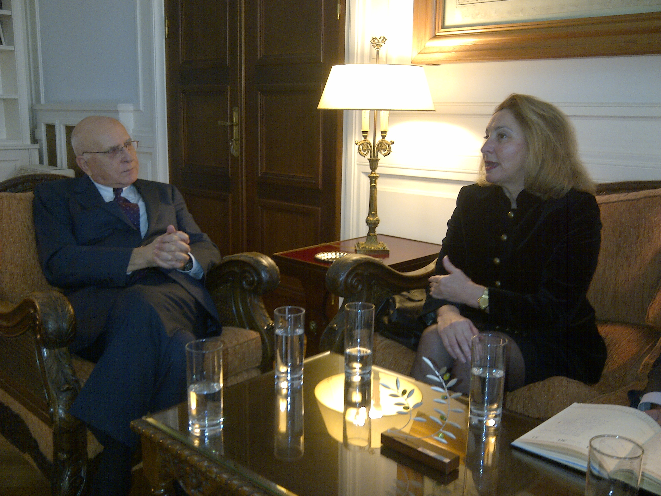 Την Παρασκευή 13 Ιανουαρίου 2012, ο Υπουργός Εξωτερικών Σταύρος Δήμας συναντήθηκε με την Πρέσβυ της Κροατίας Vesna Cvjetković.